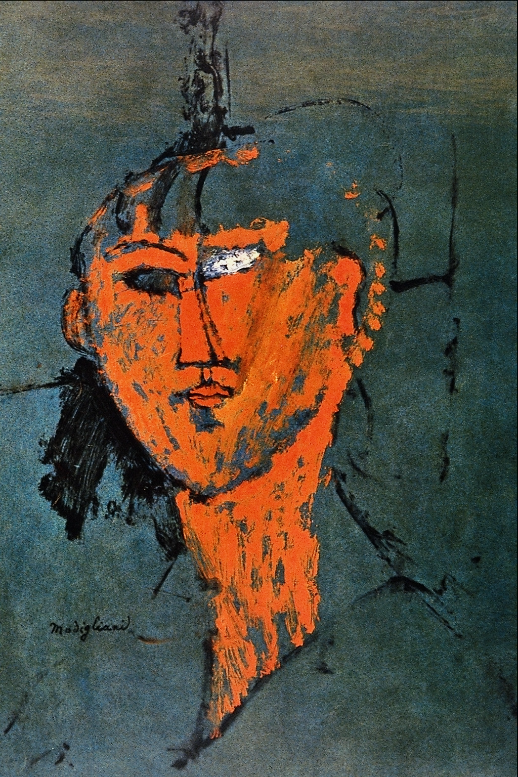 La Tete Rouge